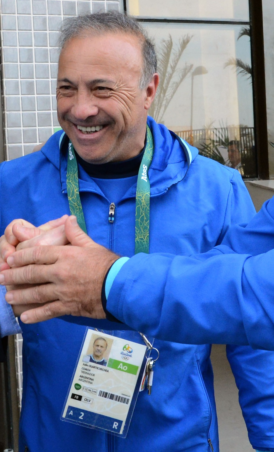 Julio Olarticoechea.